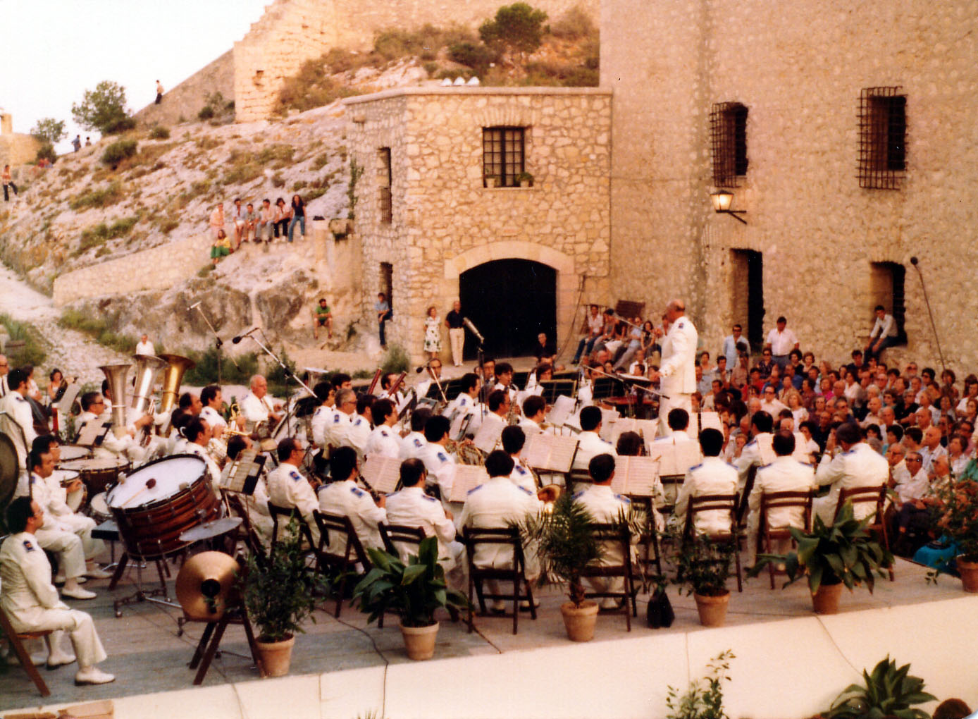 moises davia dirigiendo la banda municipal de alicante